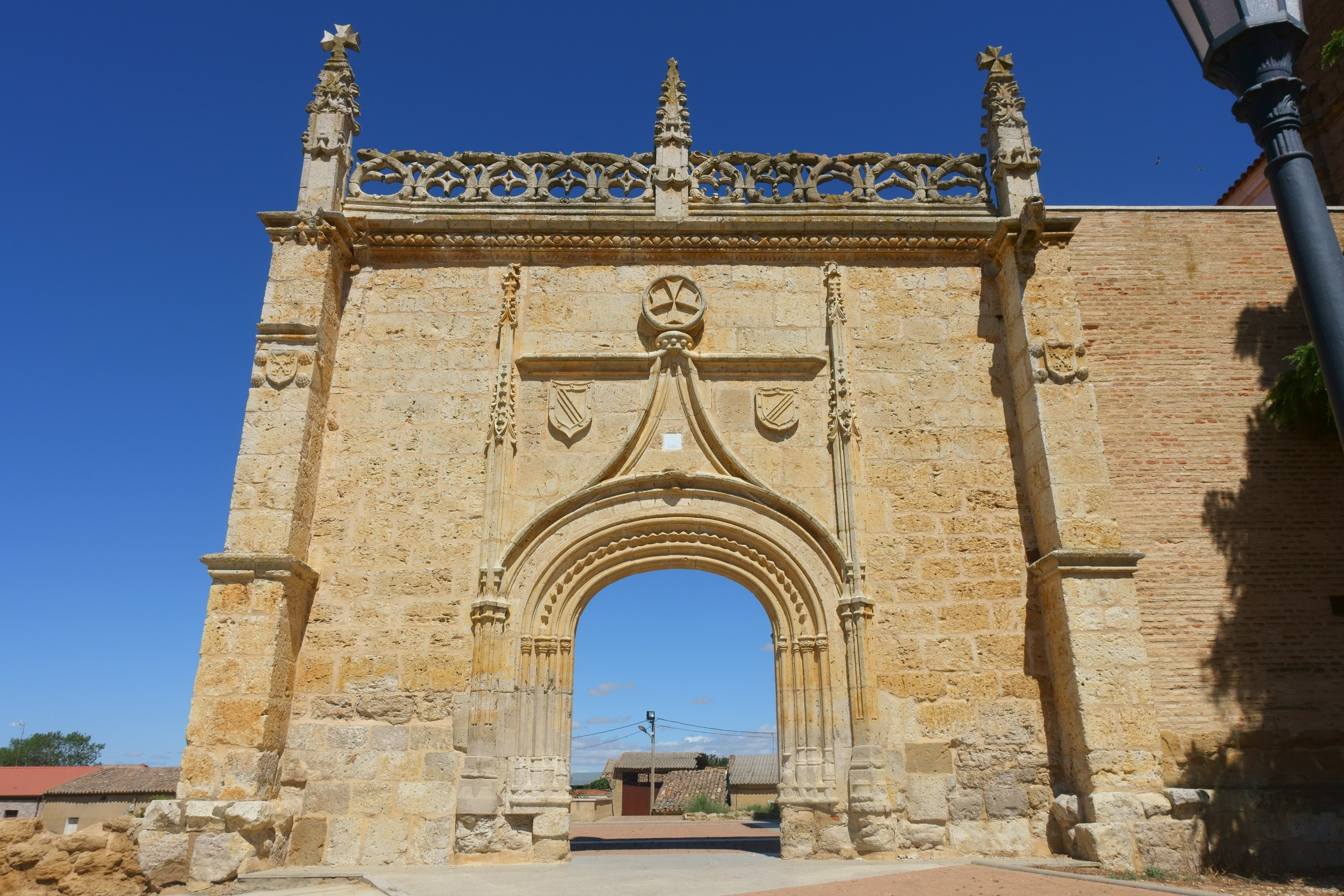 Iglesia de San Vicente, Villar de Fallaves (Zamora, España).